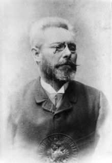 Josef Schaniak (1845-1905), český architekt a stavební podnikatel